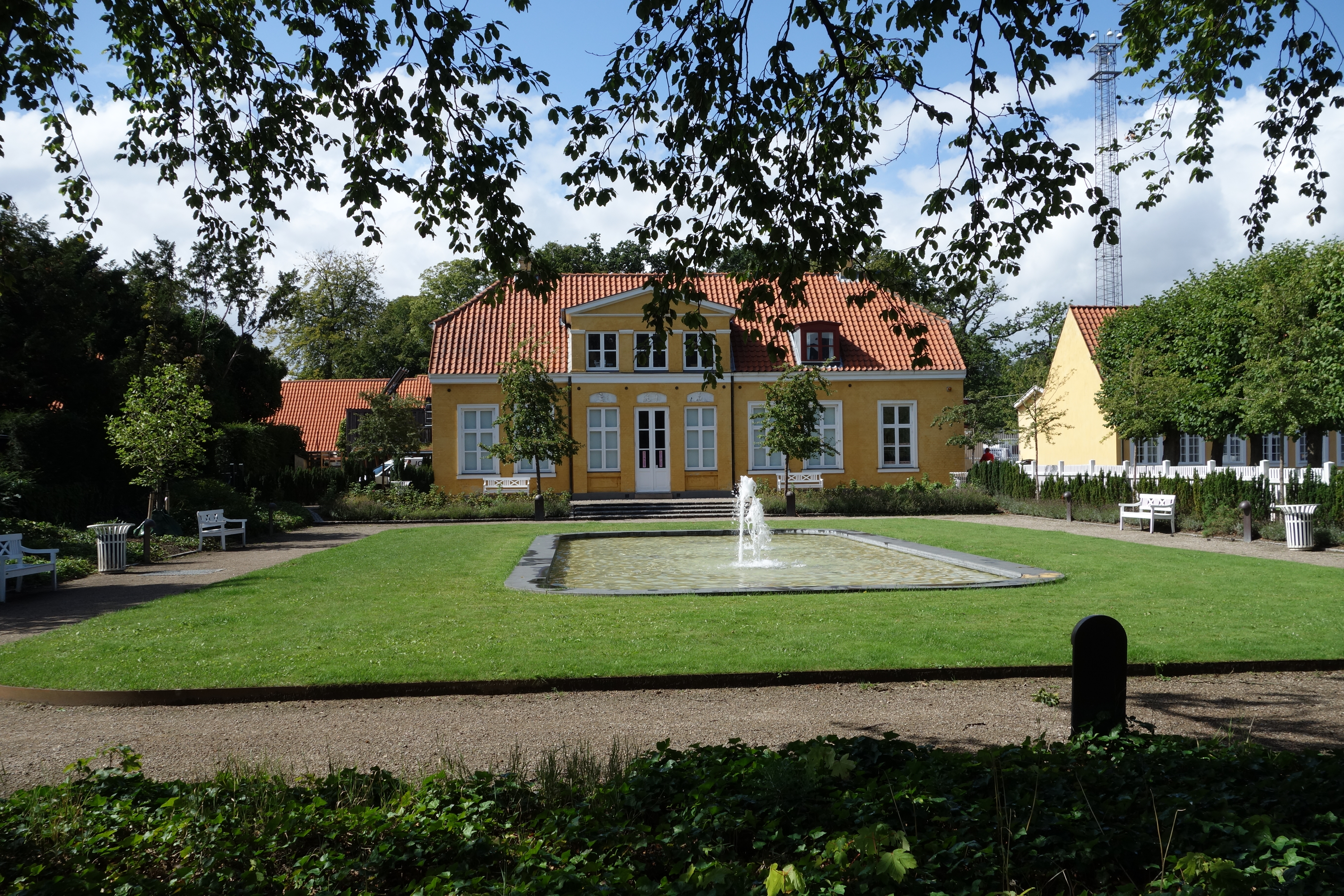 The Danish Revue Museum in Frederiksberg, Copenhagen, Denmark